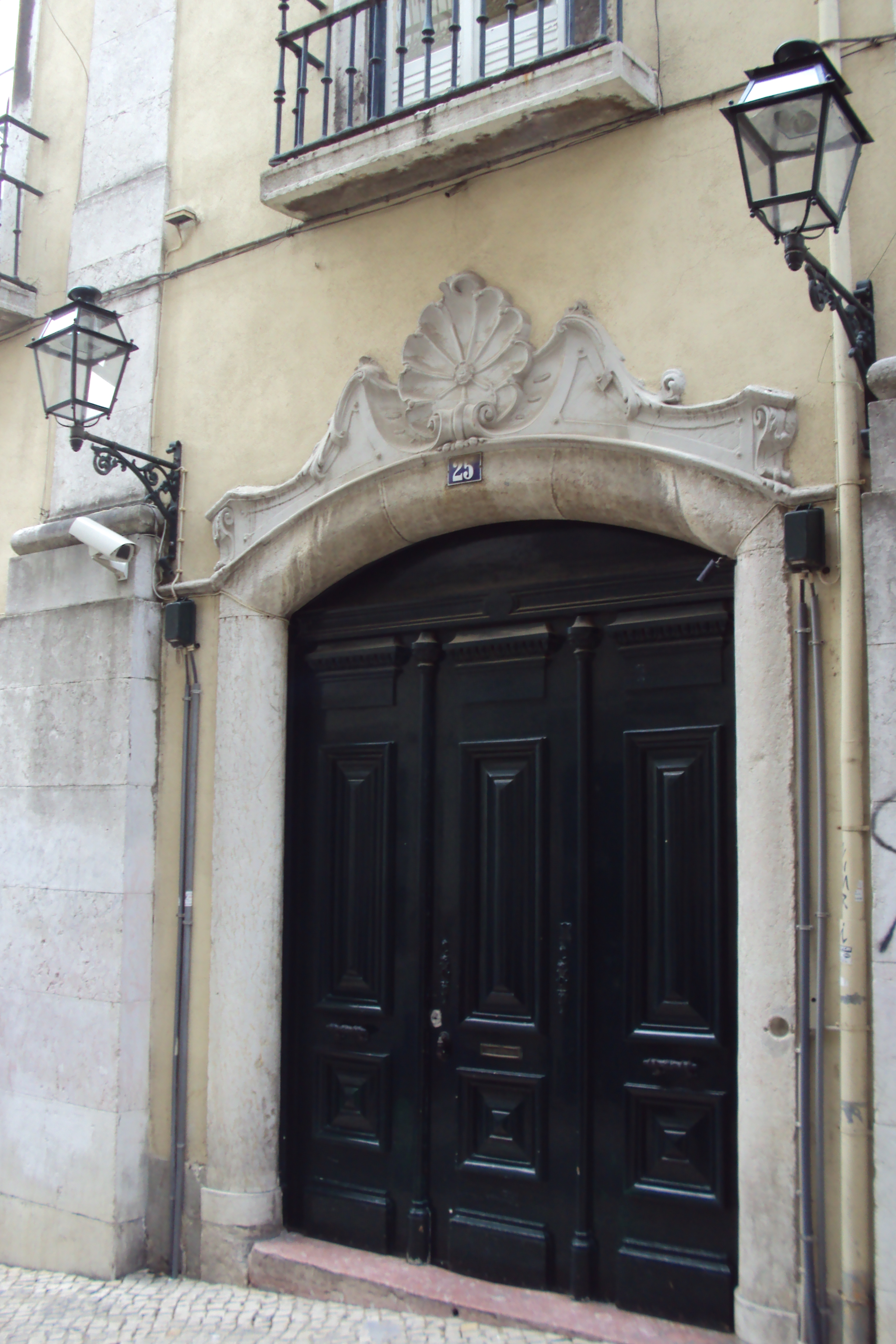 Entrada principal da Loja Grande Oriente Lusitano, Rua do Grémio Lusitano, Nr.25, 1200-211, Lisboa-Portugal